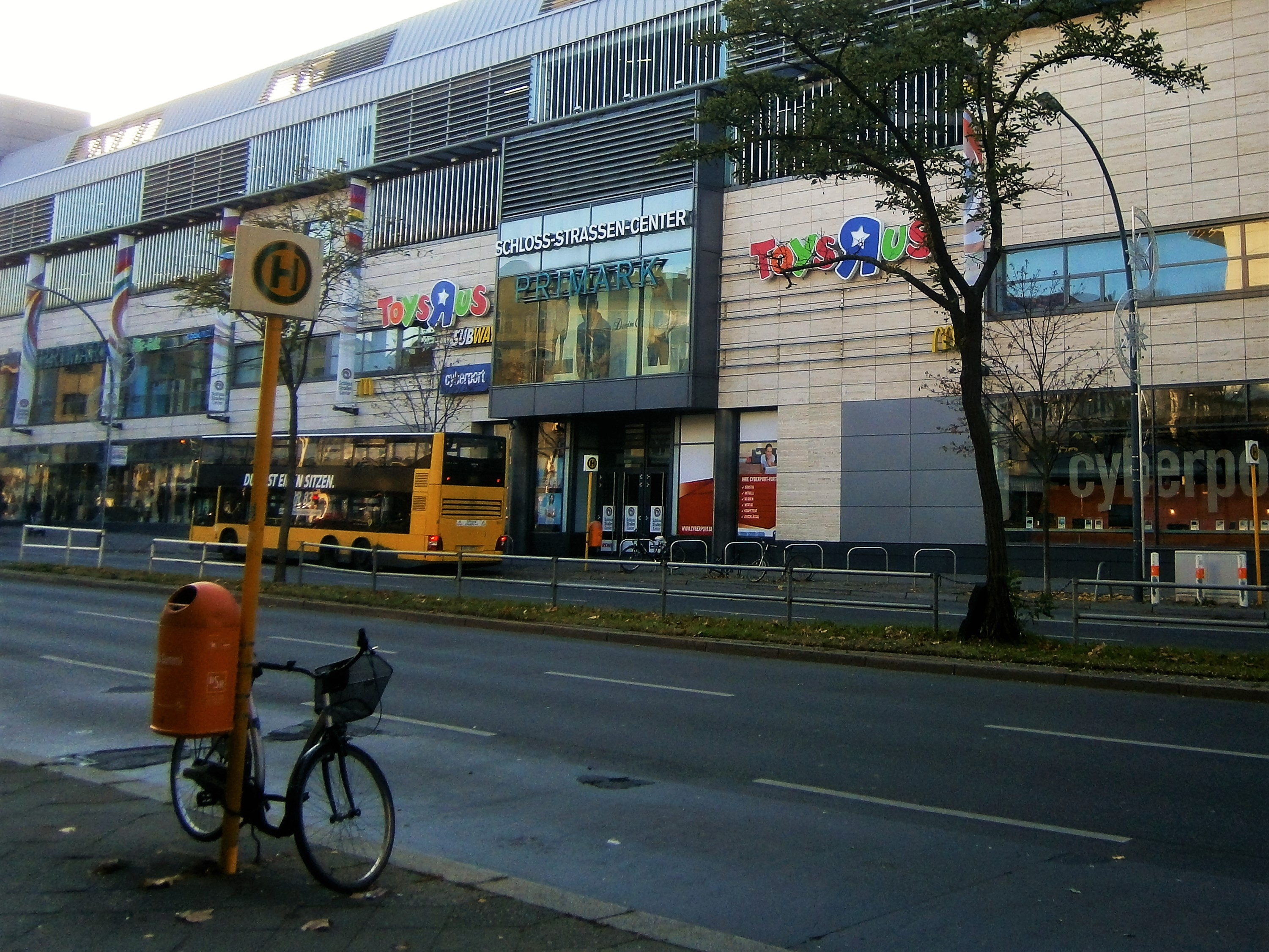 Die Bundesallee ist eine Berliner Straße im Bezirk Tempelhof-Schöneberg, Ortsteil Friedenau. Im Haus 102 befand sich 1912–1958 das Thalia, das noch unter weiteren Namen betrieben wurde. Für den Bau eines Einkaufscenters wurden die Altbauten abgerissen und ersetzt.